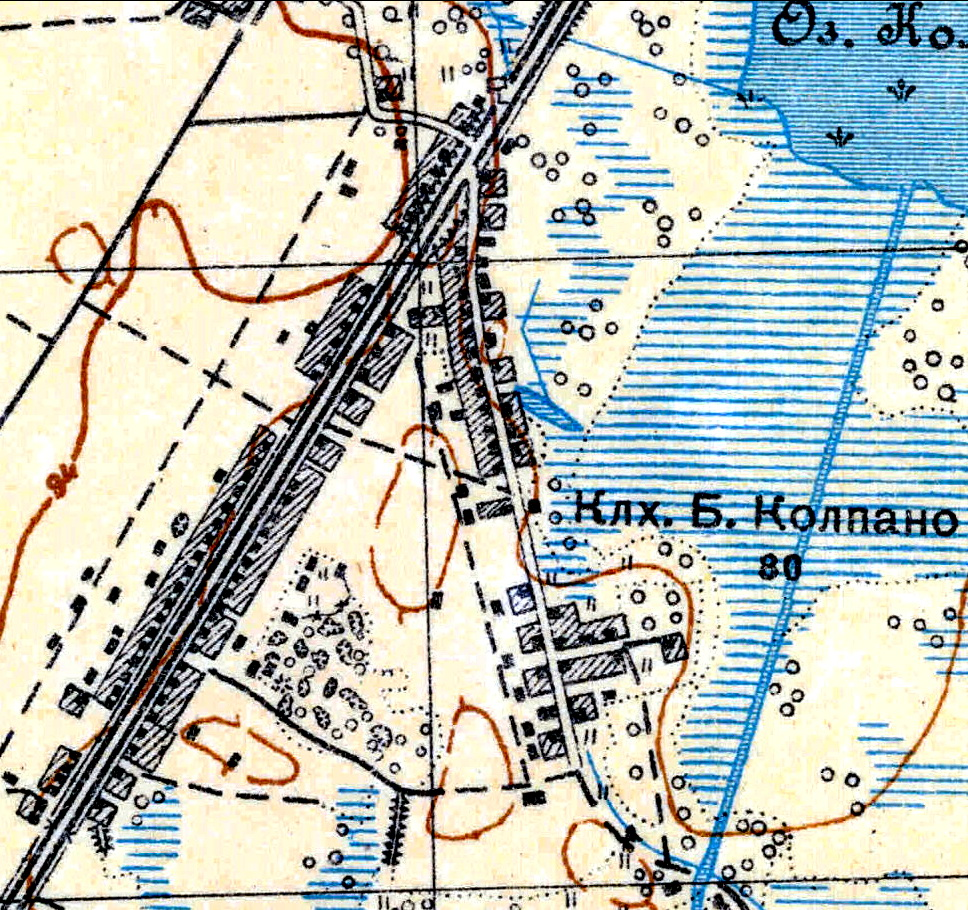 Топографическая карта Ленинградской области, квадрат О-36-13-А-в (Красногвардейск), деревня Большие Колпаны